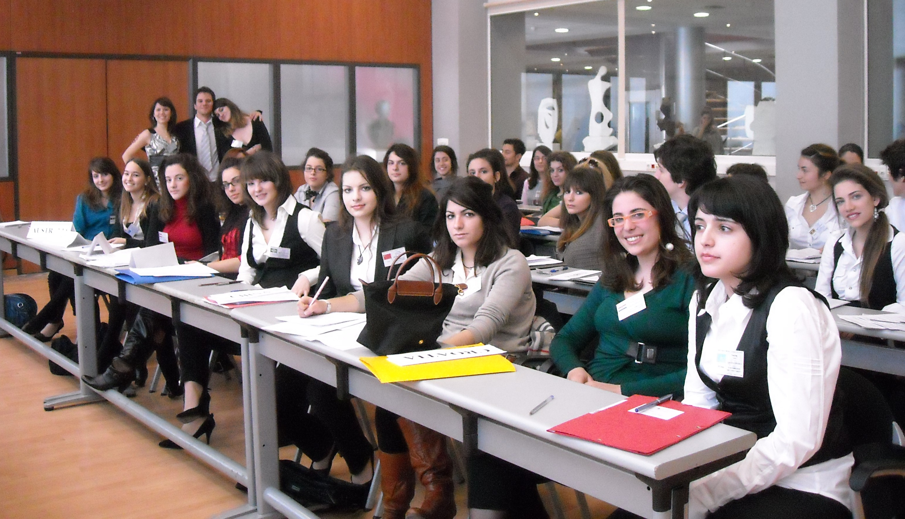 Φωτογραφία από επιτροπή της 13ης ετήσιας συνόδου του Μοντέλου Ηνωμένων Εθνών Αθηνών, που έλαβε χώρα από τις 19 έως τις 21 Μαρτίου 2010, με συμμετέχοντες μαθητές από 27 Λύκεια της Ελλάδας και του εξωτερικού